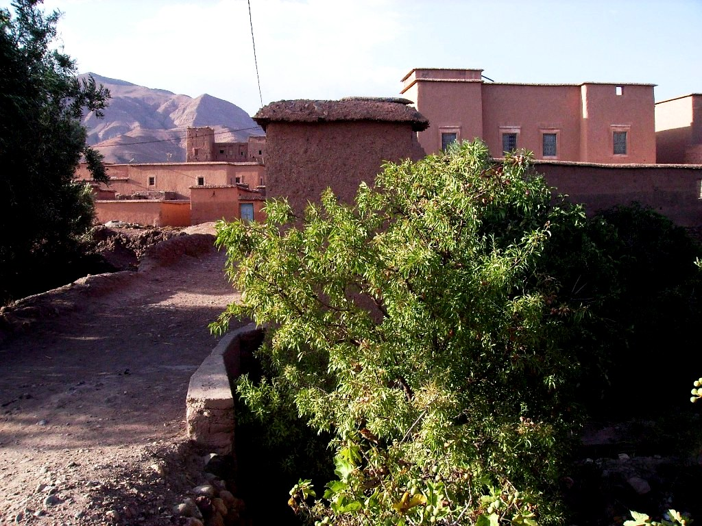 La maison de Idder BATTAH